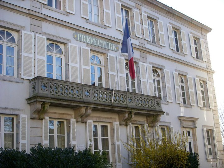 L'hôtel de préfecture de la Haute-Saône à Vesoul